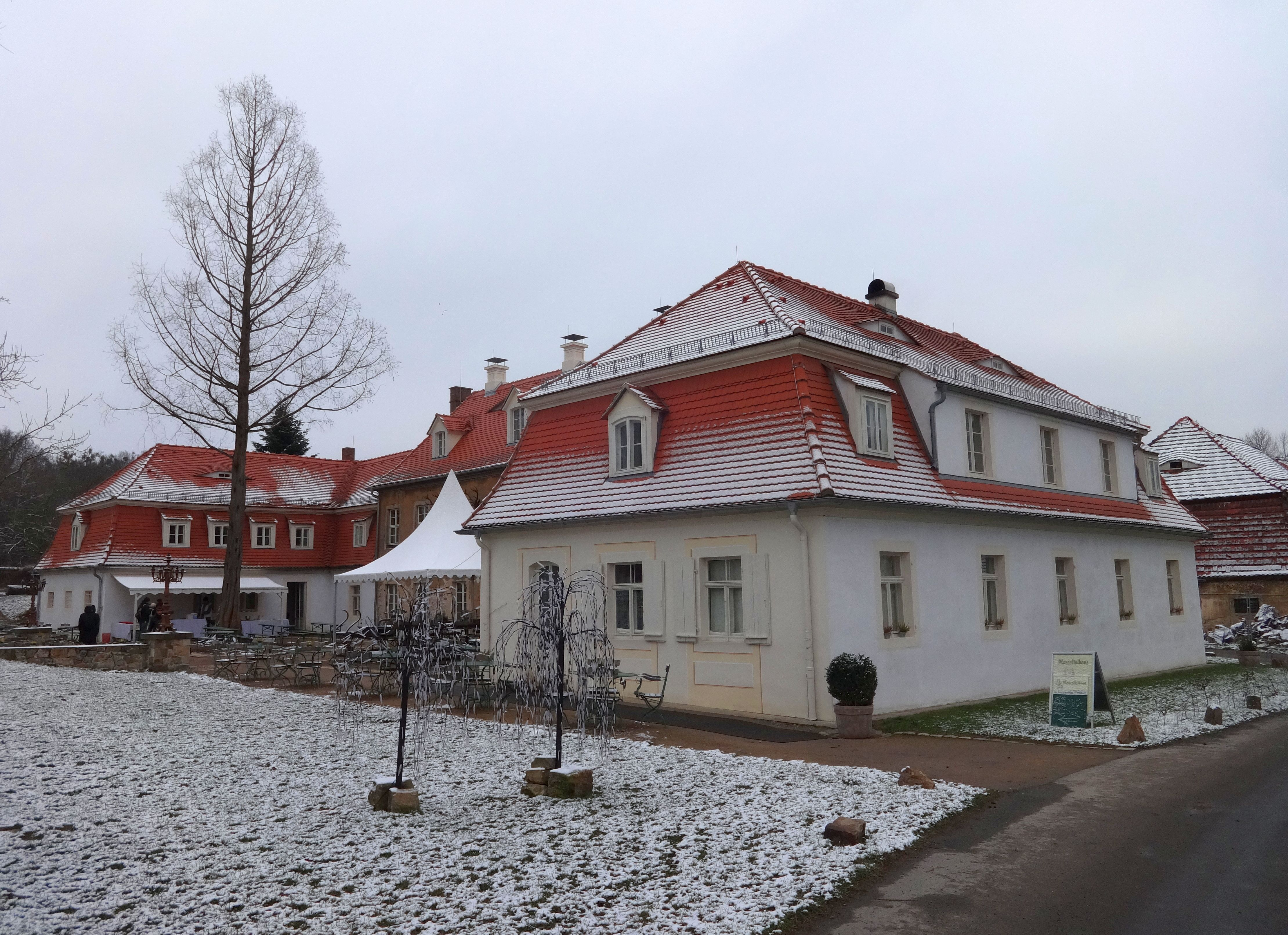 Das Marcolinihaus in Moritzburg, Blick von SW